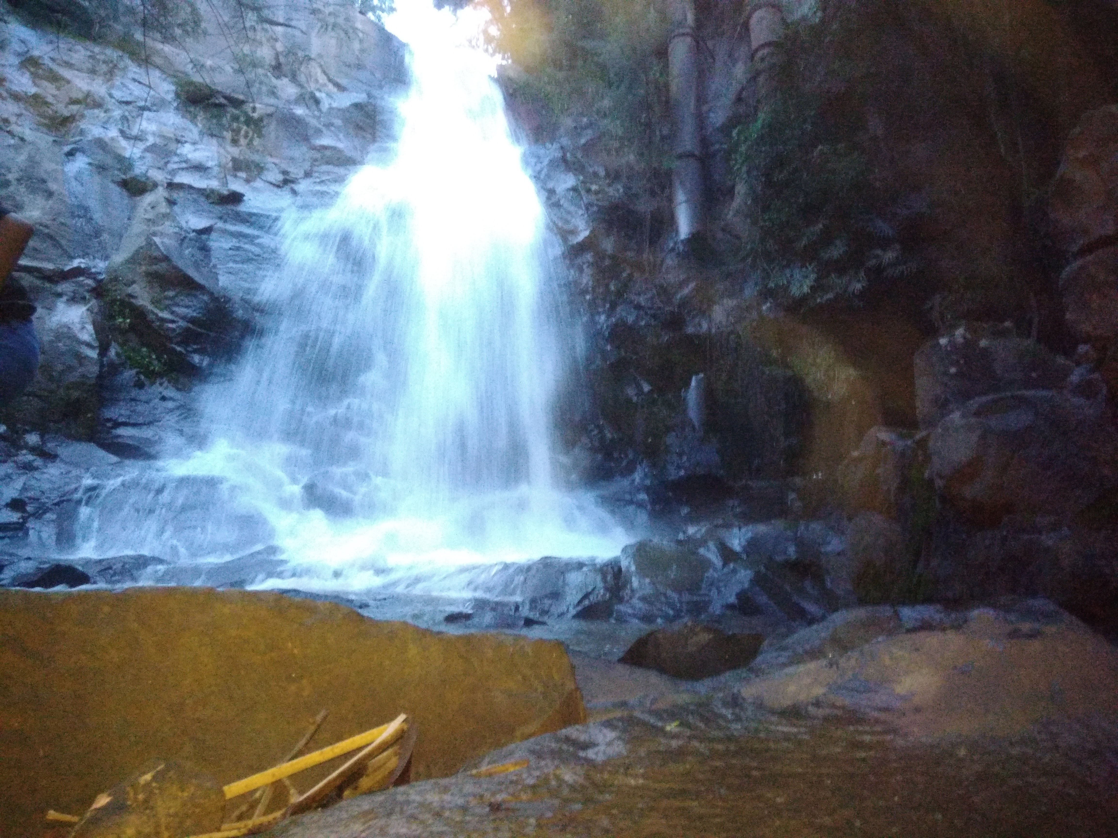 Cachoeira localizada no Parque Pretória em Franco da Rocha, próximo a Escola Superior de Bombeiros